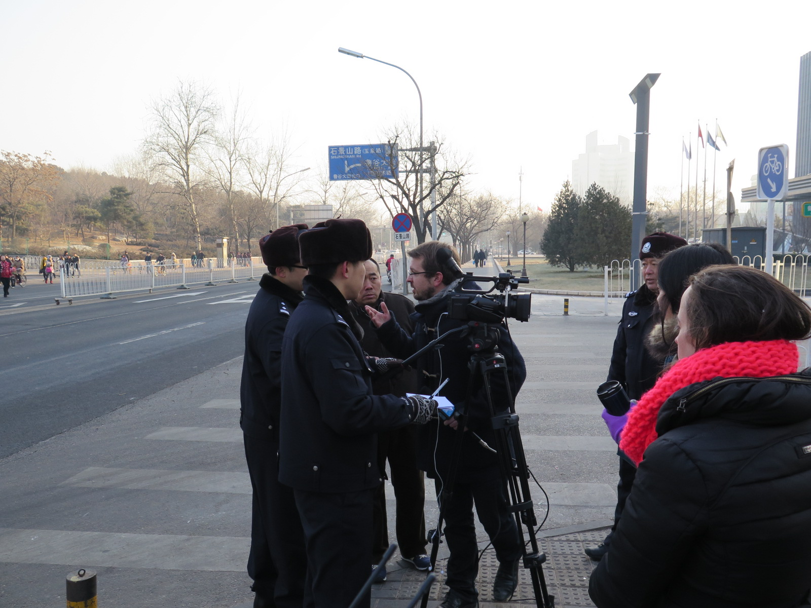 中文（中国大陆）: 许志永案庭审当天，警察下令外国记者离开，记者据理相争